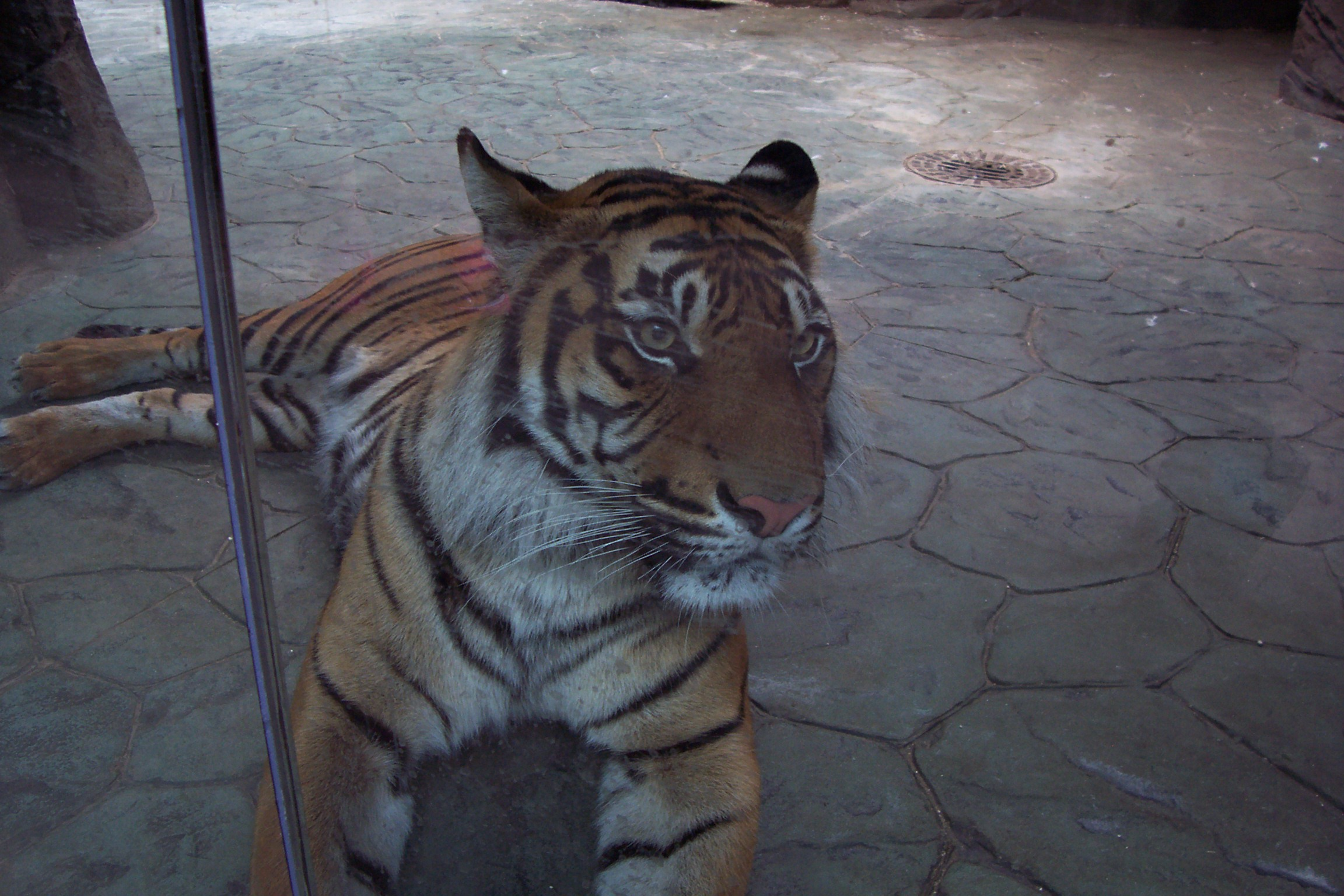 Vyfotografováno v brněnské zoo